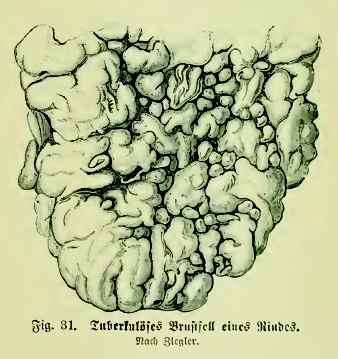 Fig. 31. Tuberkulöses Brustfell eines Rindes. Nach Ziegler.